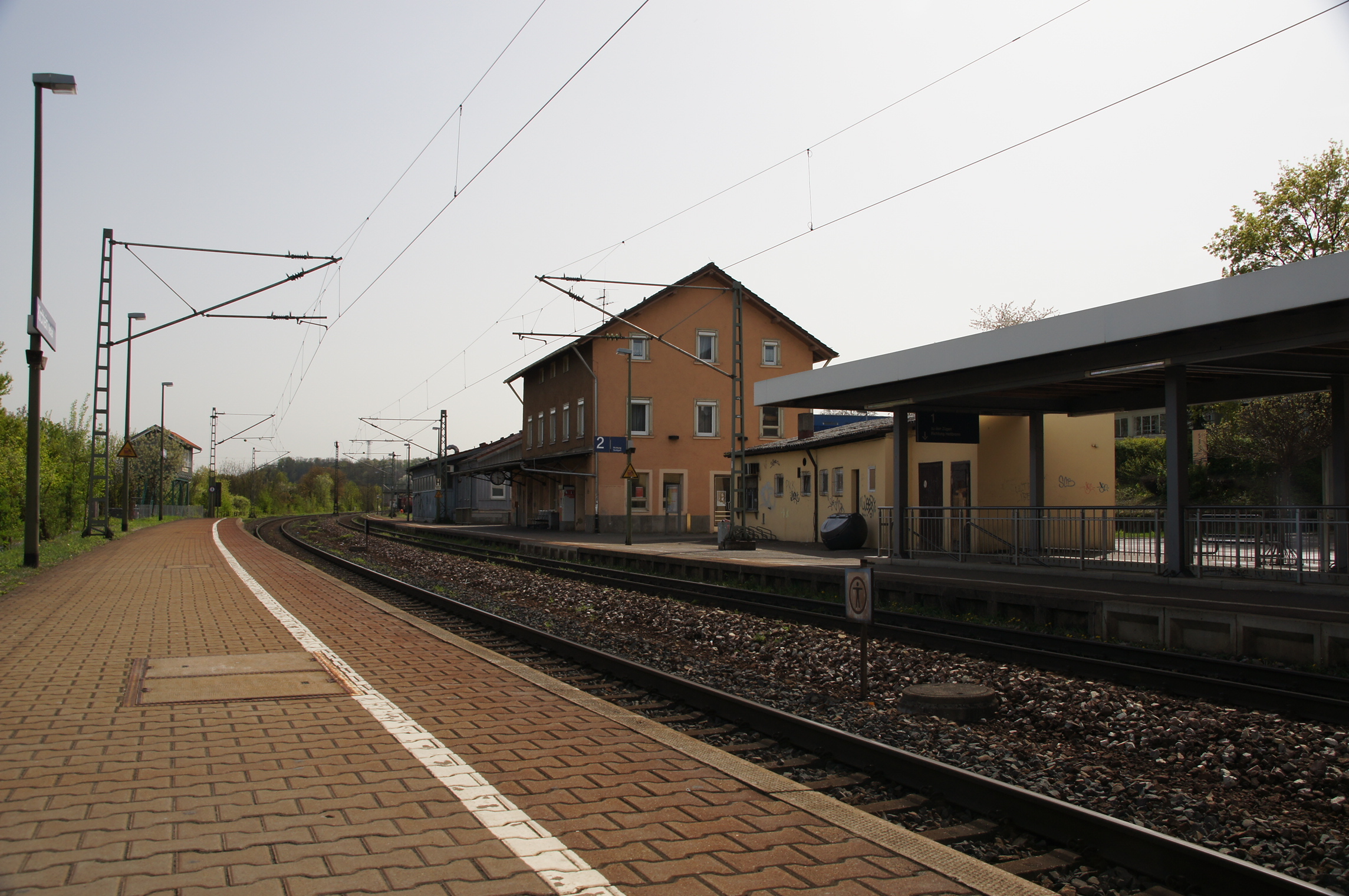 Haltepunkt Kirchheim am Neckar